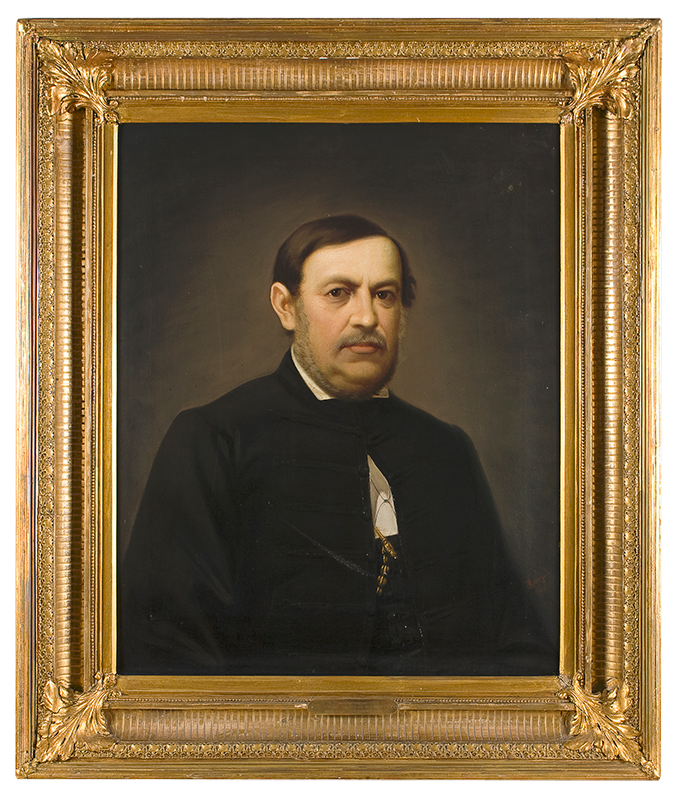 Portret Stevana Branovačkog slikara Aksentija Marodića koji se nalazi u svečanoj sali Matice Srpske (Novi Sad).